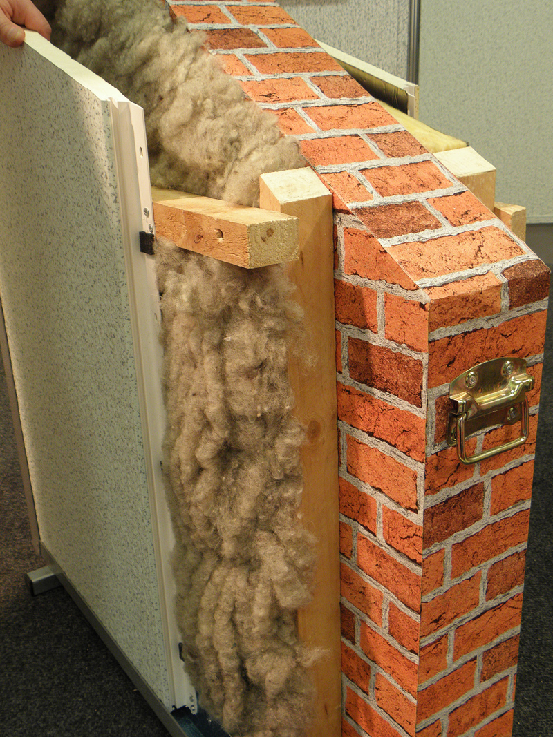 Wärmedämmung an der Wand